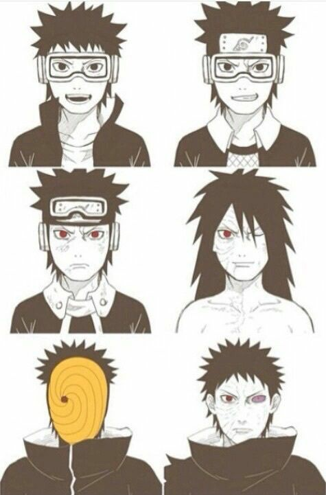 أوبيتو أوتشيها